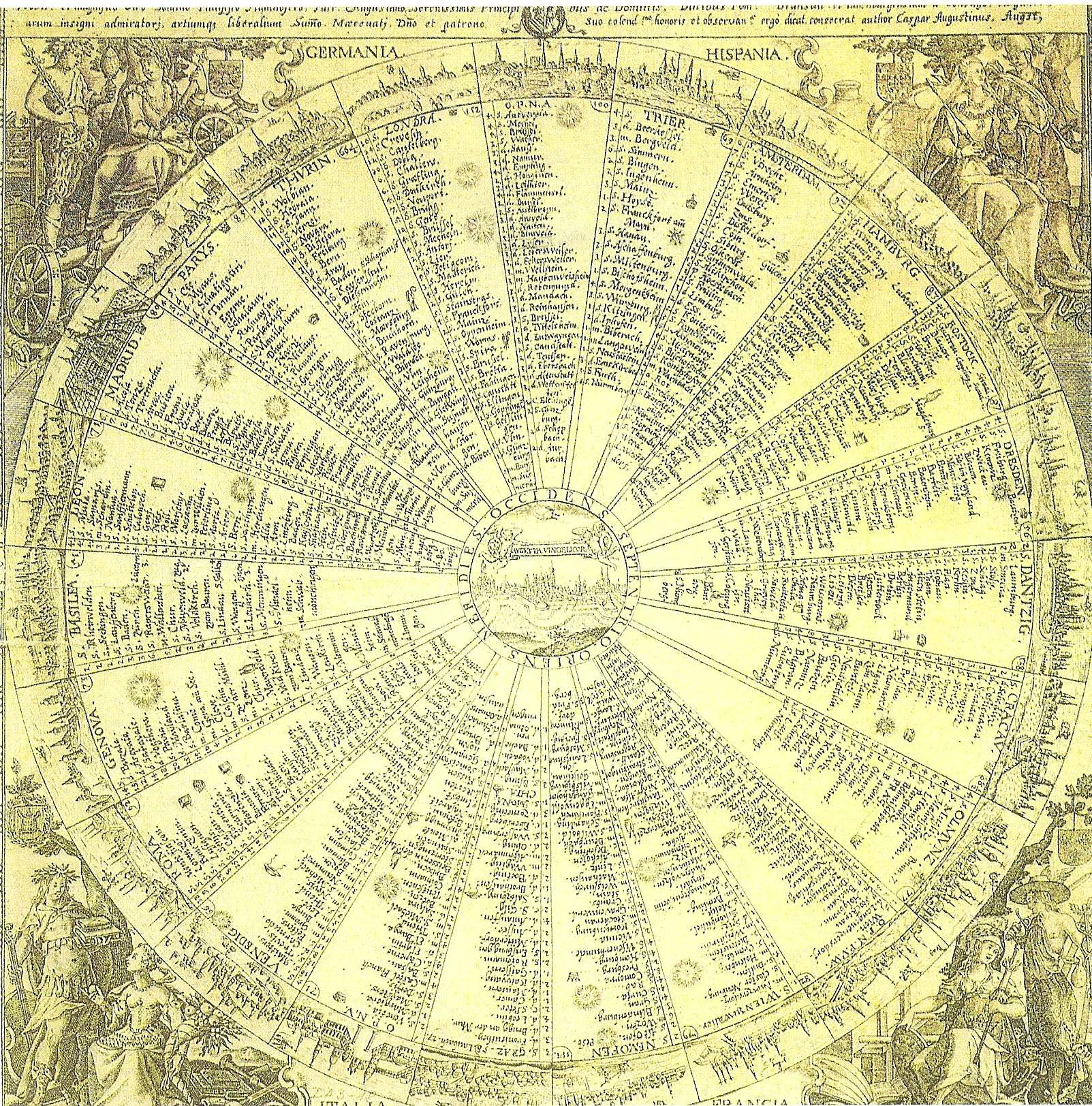 Die jüngere Augsburger Meilenscheibe von 1629 mit Reichsstraßen und Postrouten, wie O. P. N. A. =Ordinaripost nach Antwerpen, O. P. N. V. Ordinaripost nach Venedig oder O. P. N. P. V. W. =Ordinaripost nach Prag von Wien